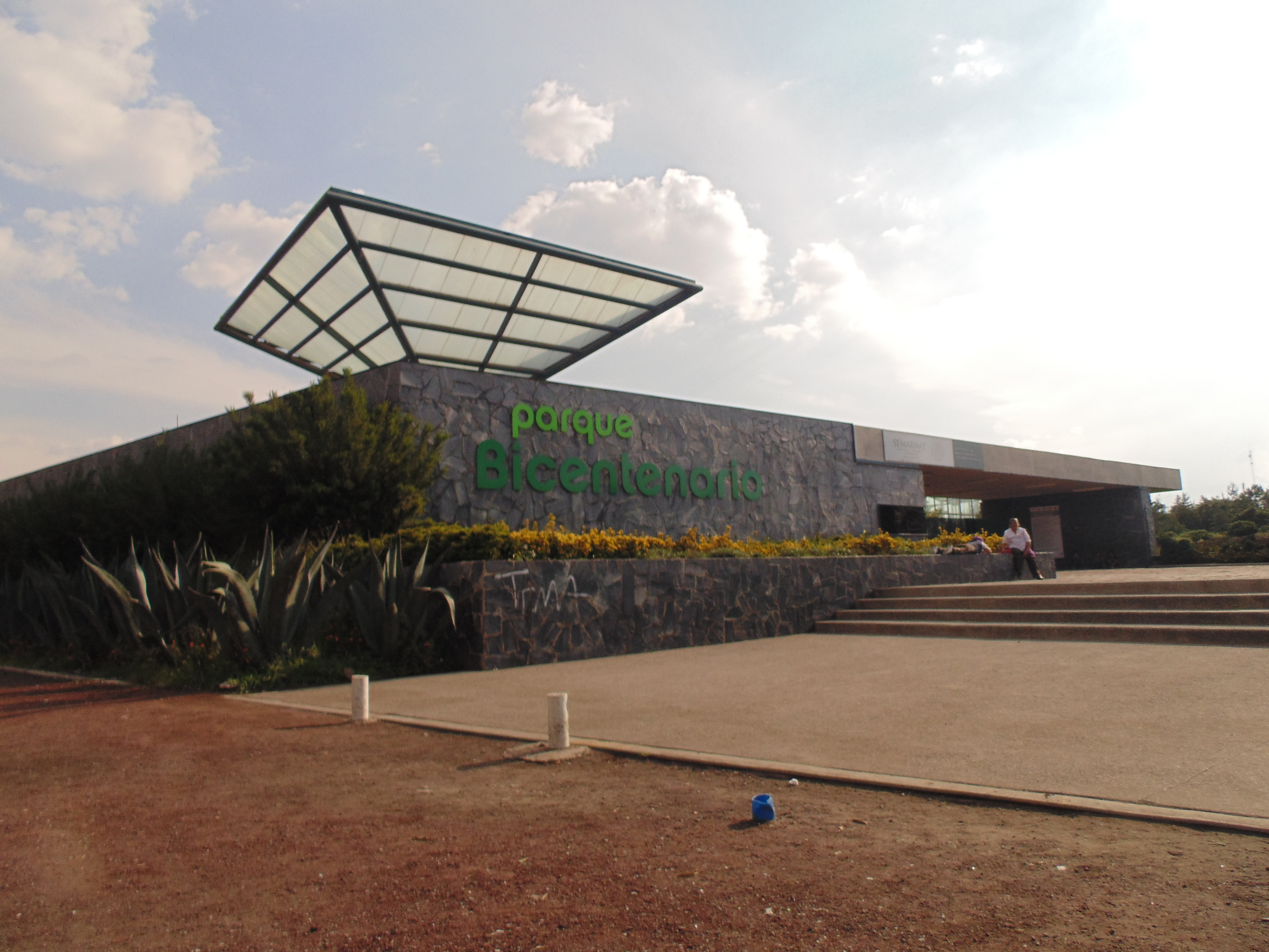 Entrada del parque.